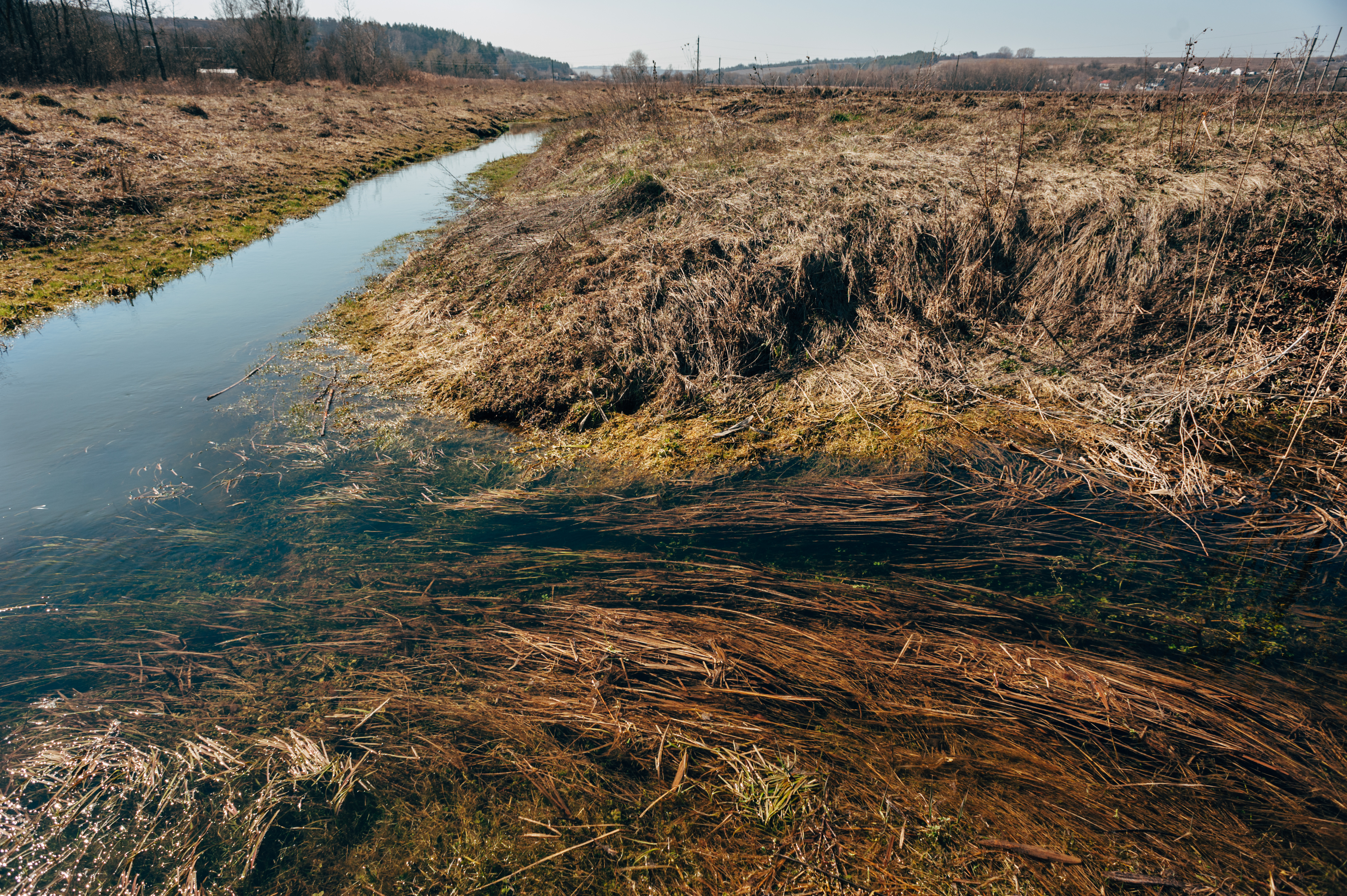 Зправа на ліво впадає Руда у Леглич